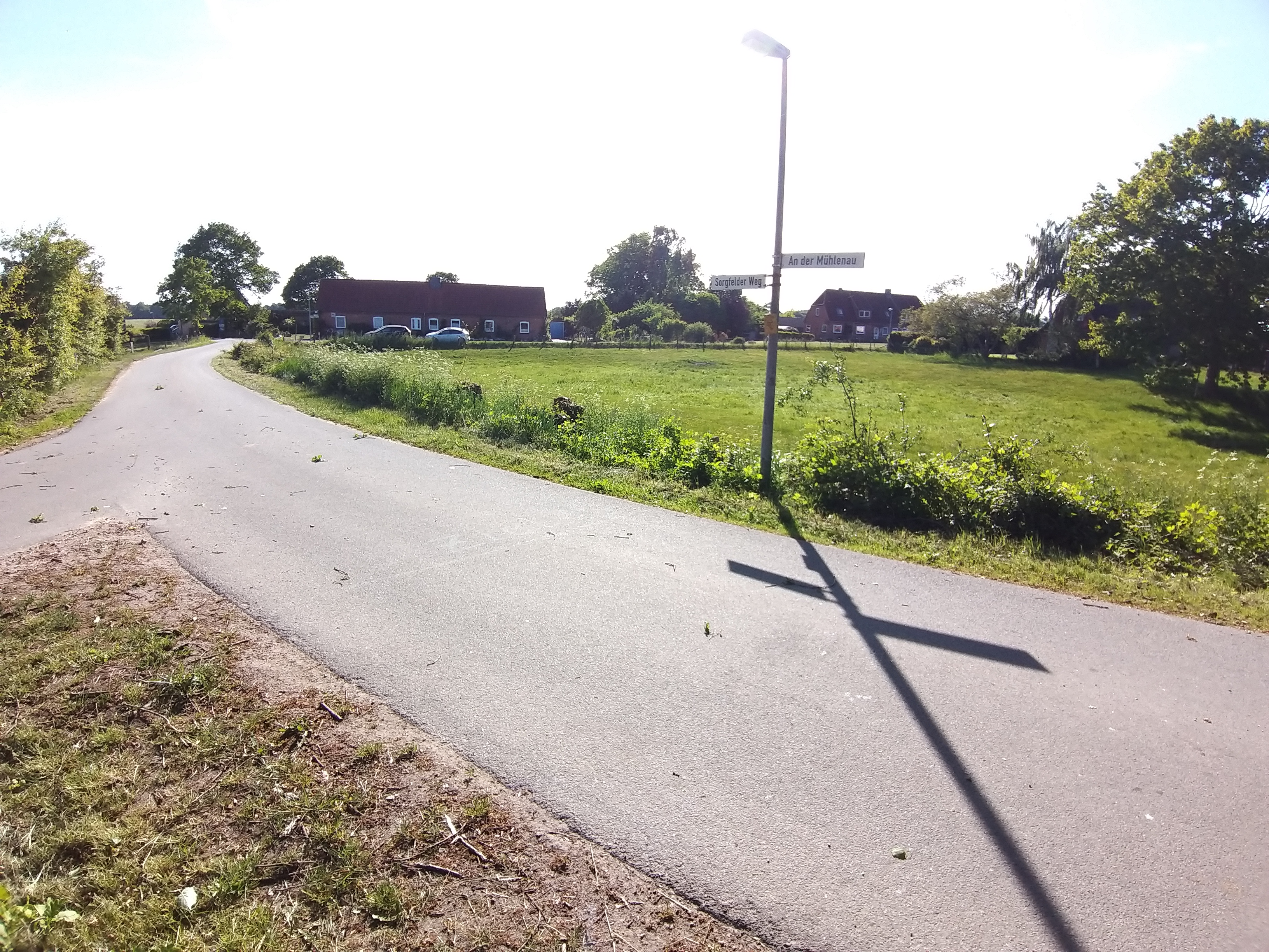 An der Mühlenau 24214 Lindau